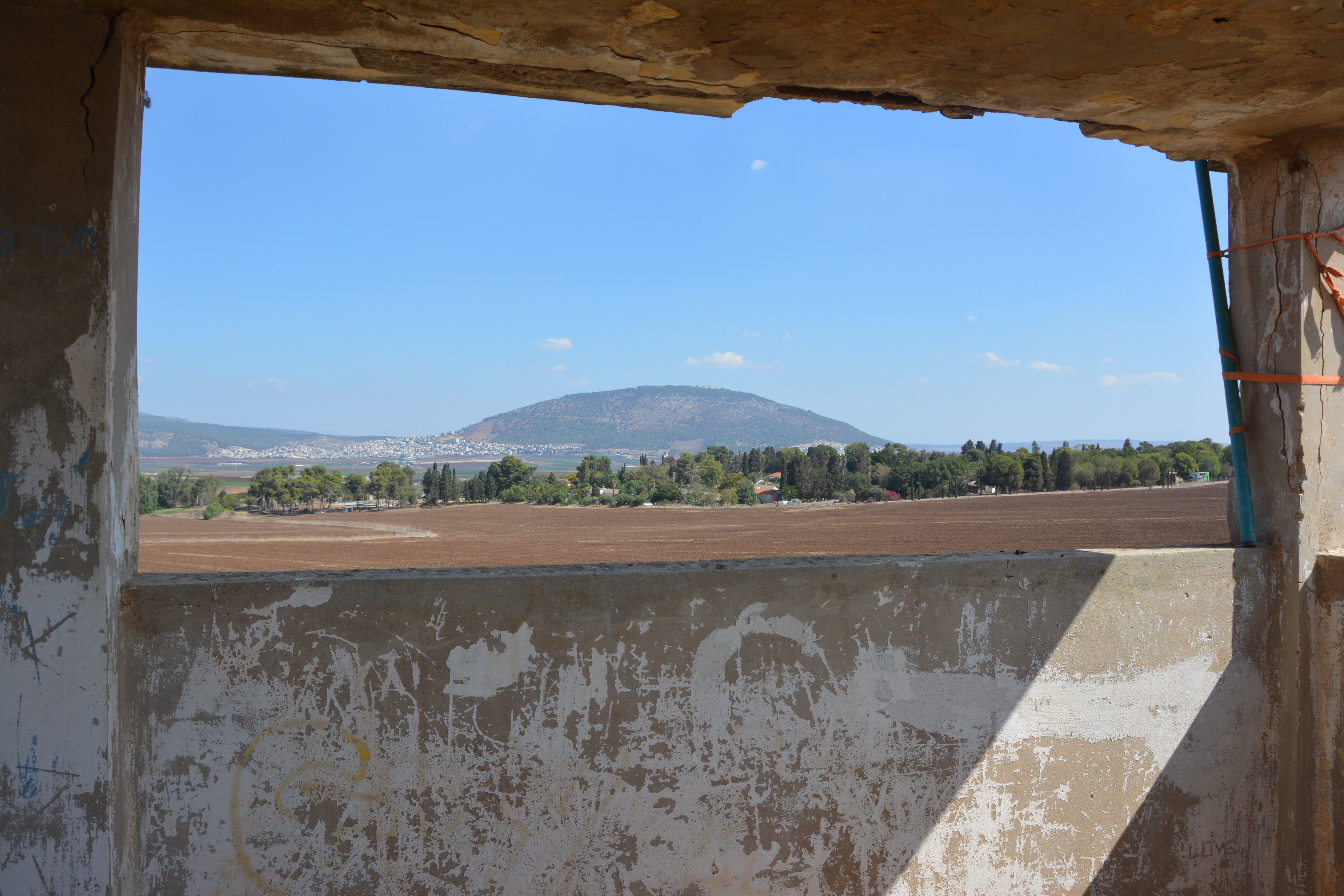 מחנה ישראל (דברת) היה קומונה של פועלי אגודת ישראל שהתארגנה לקראת חיי קיבוץ. אנשי הקבוצה התיישבו על אדמה שנרכשה בשנת 1925 בעמק יזרעאל, ליד קיבוץ דברת של היום.